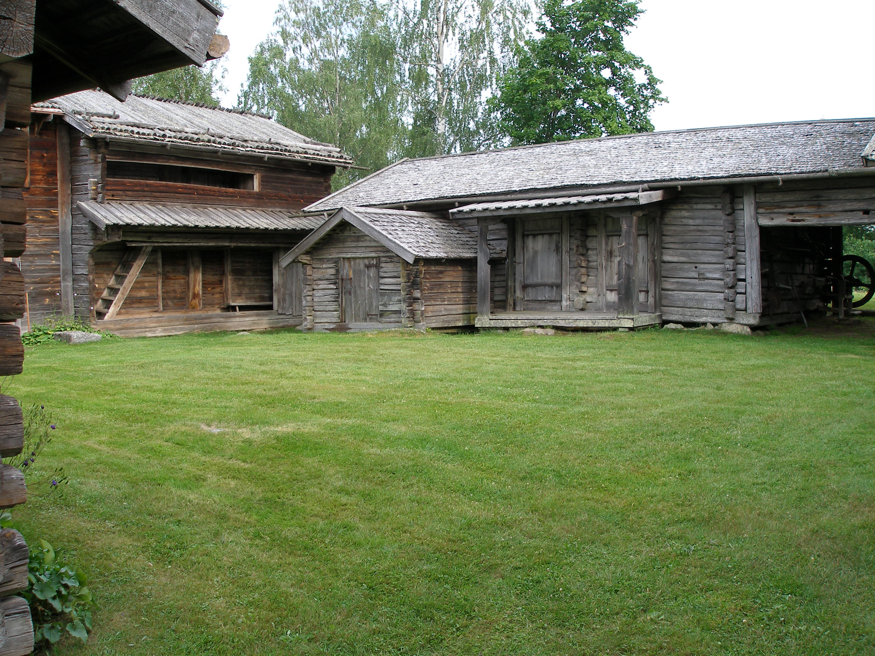 Lisskvarngården i Nås